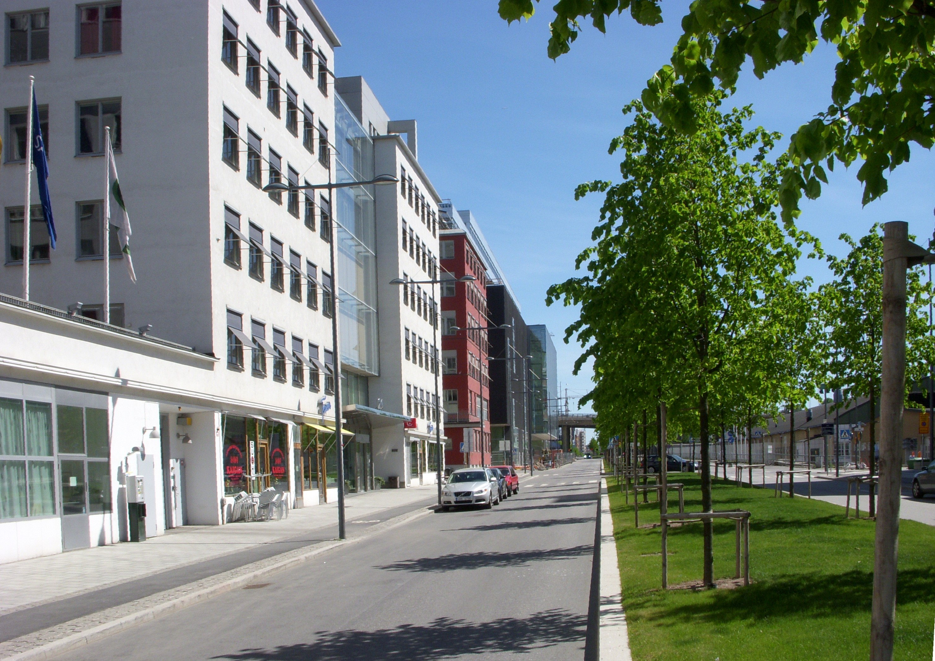 Lindhagensgatan på Kungsholmen, Stockholm, vy mot sydväst